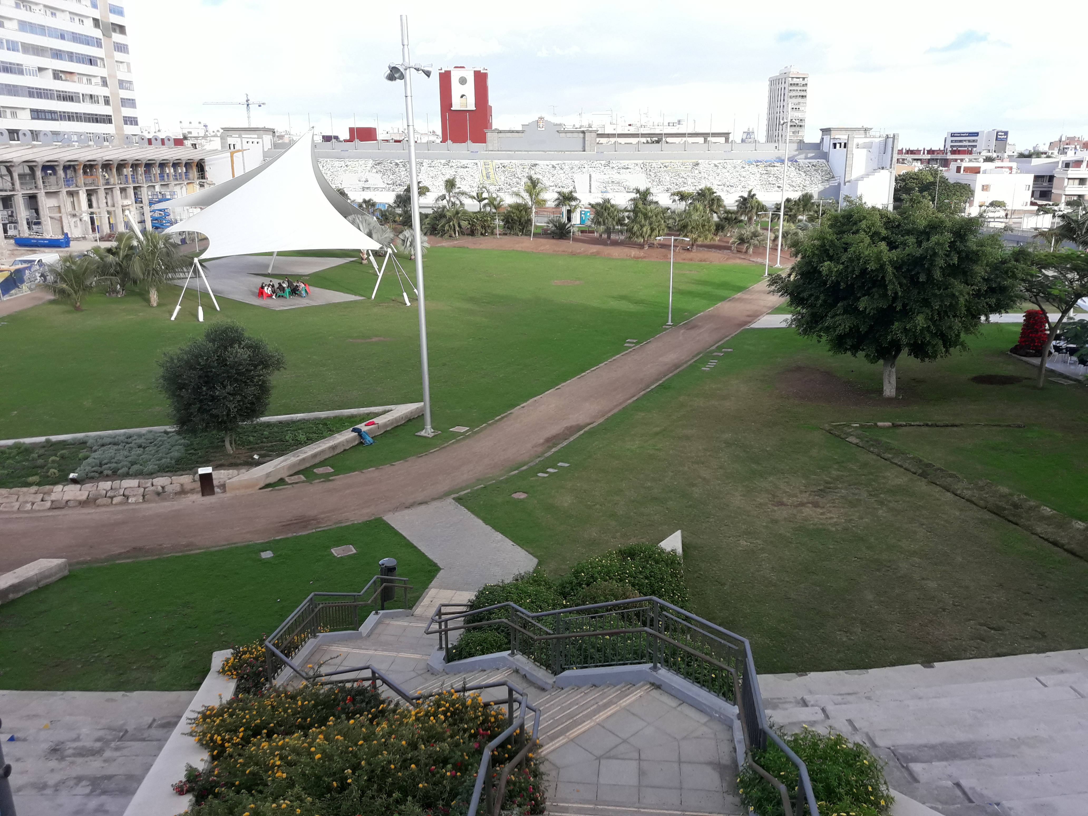 Parque del estadio Insular el Las Palmas de Gran Canaria. Vista desde la antigua grada Curva